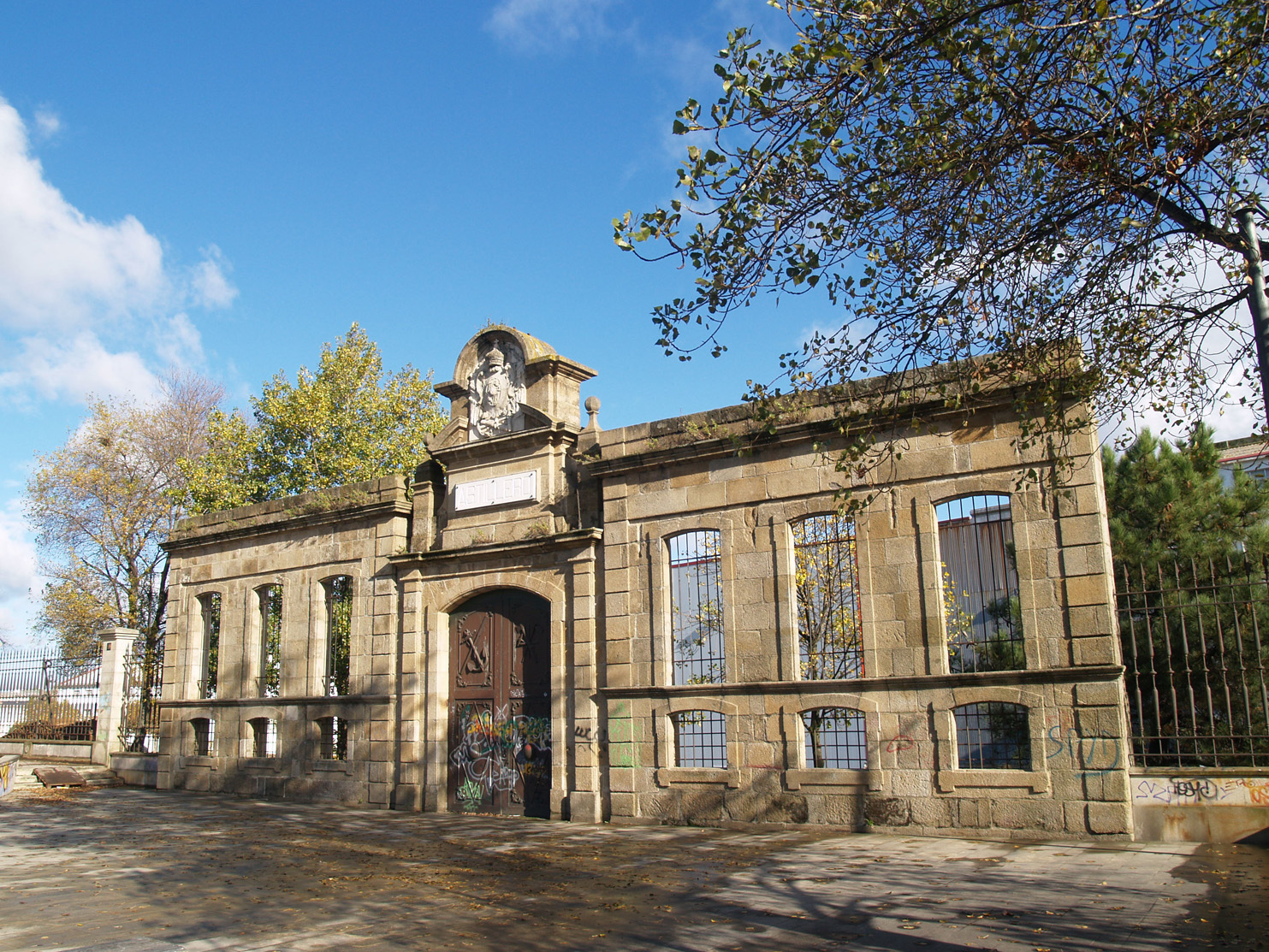 Antiga porta do estaleiro - Ferrol